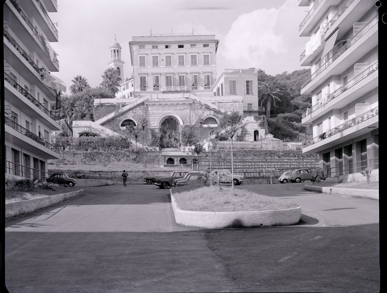 Genova-Pegli, villa Durazzo Pallavicini, sede del museo di archeologia ligure, facciata principale vista da via Garelli. Servizio fotografico : Genova, 1963 / Paolo Monti. - Buste: 10, Fototipi: 10 : Negativo b/n, gelatina bromuro d'argento/ pellicola ; 10x12. - ((Serie costituita da 10 buste sciolte di negativi identificati con i nn.: 7448, 7449, 7450, 7451, 7452, 7453, 7454, 7455, 7456, 7457. - Il negativo identificato con il numero 46397 è stato realizzato per Zodiac. - Occasione: Documentazione per la pubblicazione: Italia Nostra (a cura di), "Le ville genovesi", catalogo della mostra, Genova 1962, Genova, Comune di Genova, 1967. - (1963-1966), presso Archivio Paolo Monti. Camicia con documenti dattiloscritti e manoscritti vari relativi al lavoro eseguito per Italia Nostra: preventivi, lettere, inventari. - Fonte: Rubrica di Paolo Monti: Archivio fino 1-4-1961/ 31-3-1963 (1961-1963), presso Archivio Paolo Monti. - Fonte: Agenda di Paolo Monti: R 1 - Monti/ 1 aprile 1963 - 6 giugno 1964/ 6000-8193 (1963-1964), presso Archivio Paolo Monti. - Fonte: Monografia di Italia Nostra (a cura di): Le ville genovesi, catalogo della mostra, Genova 1962, Genova, Comune di Genova (1967). - Fonte: Lettera di Paolo Monti: I. Carteggi/ Genova - Enrico